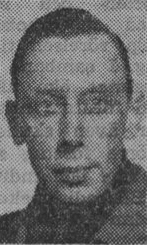 Stig Ancker